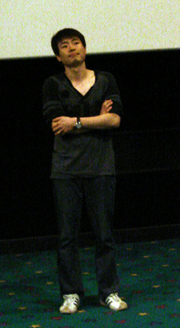 다찌마와리 무대인사 중인 류승완 감독